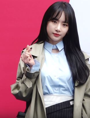 그룹 '우주소녀(보나, 설아)'가 21일 오후 서울 중구 동대문디자인플라자(DDP)에서 열린 '2019F/W 서울패션위크' 유저 컬렉션에 참석했다.